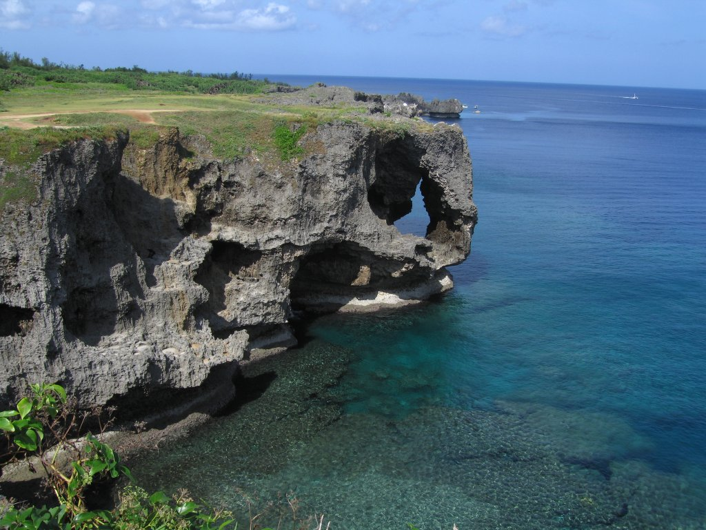 Manzamo.Aug,2005.